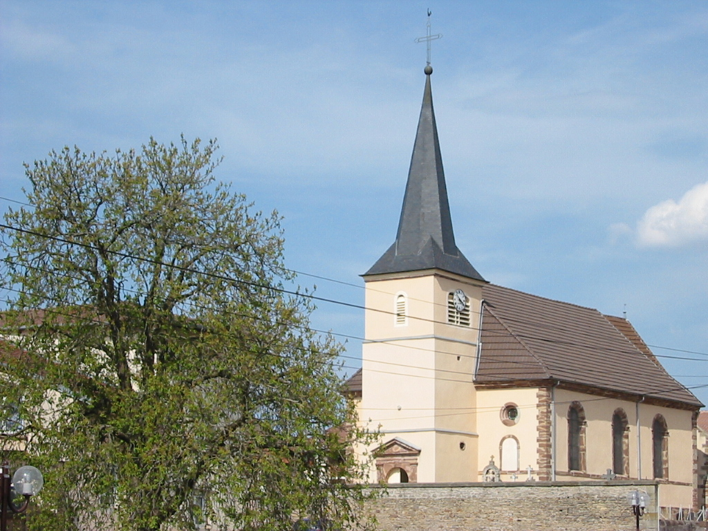 Sainte-Hélène Commune des Vosges L'église Saint-Georges Photographie personnelle, prise le 24 avril 2006 Copyright © Christian Amet